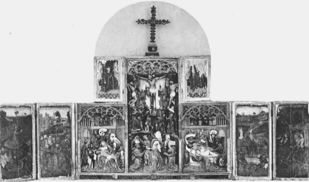 Le retable de Ternant (Nièvre) : disposition d'ensemble 1